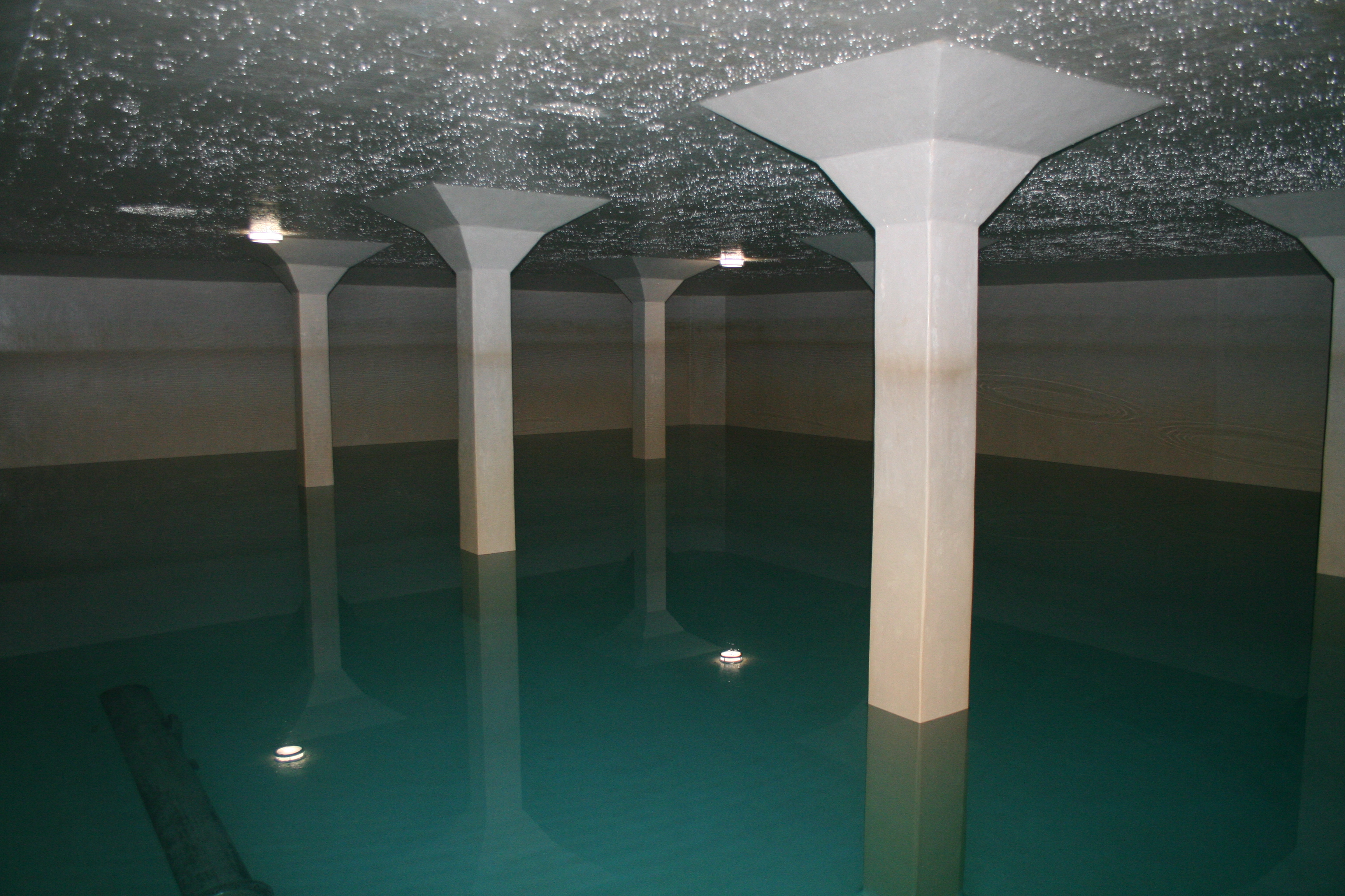 Trinkwasserreservoir Schlund in Zollikon